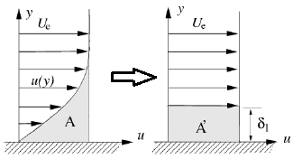 Paramètres caractéristiques de la couche limites